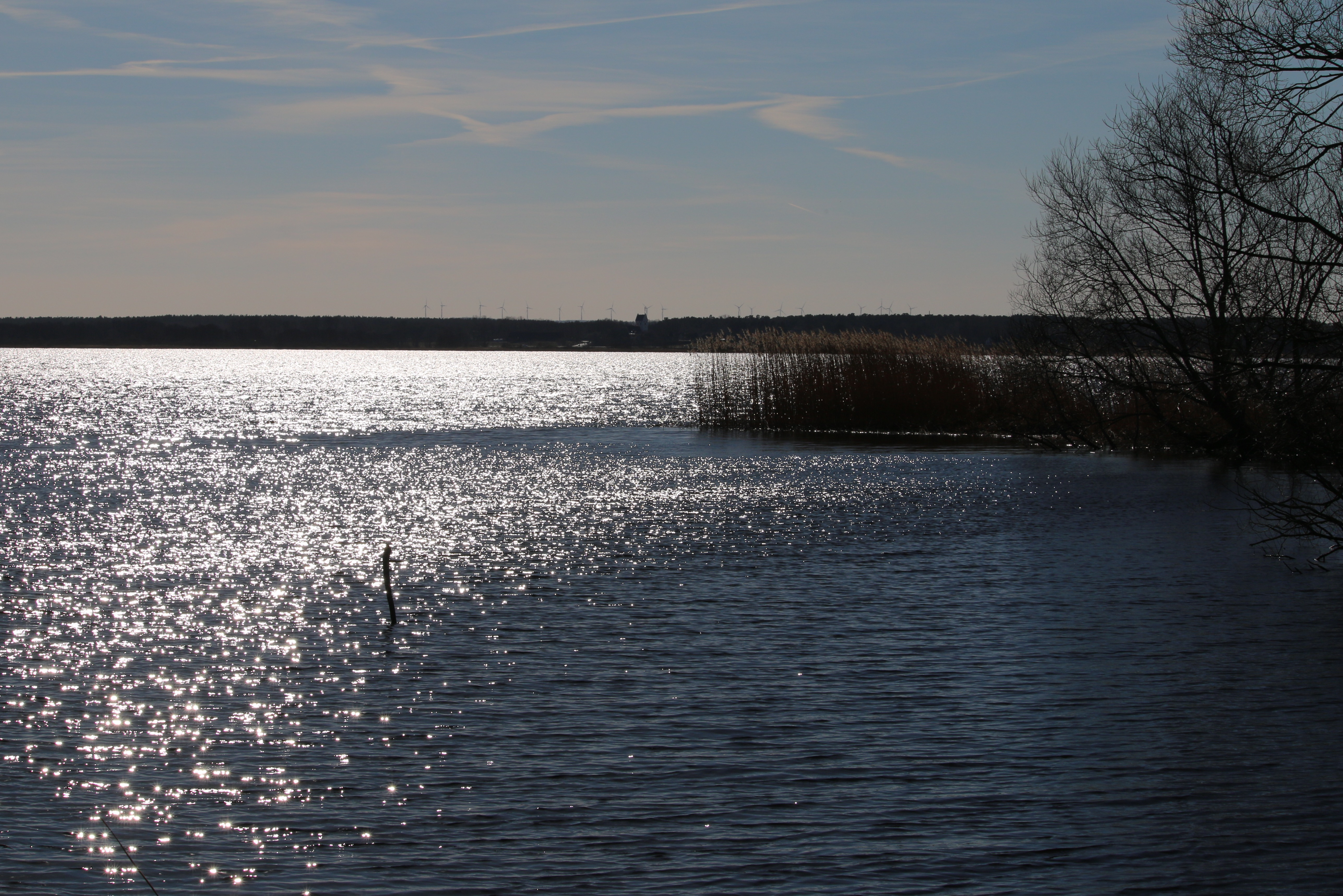 Hammarsjön